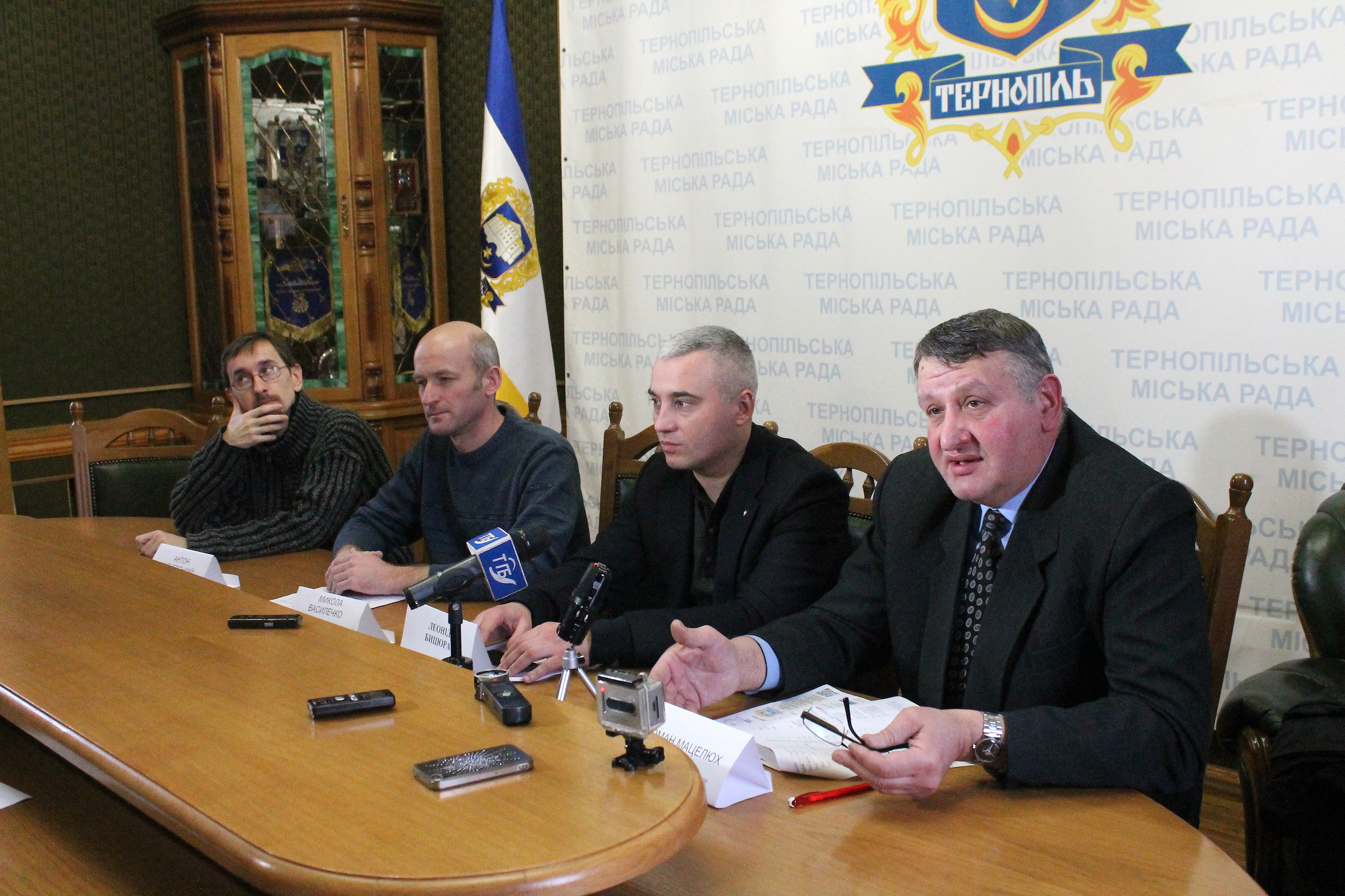 Вікімарафон у Тернополі. Прес-конференція у Тернопільській міській раді. Журналіст, вікіпедист Антон Марчевський, фотожурналіст, вікіпедист Микола Василечко, заступник міського голови Тернополя Леонід Бицюра, Великобірківський селищний голова, вікіпедист Роман Мацелюх.